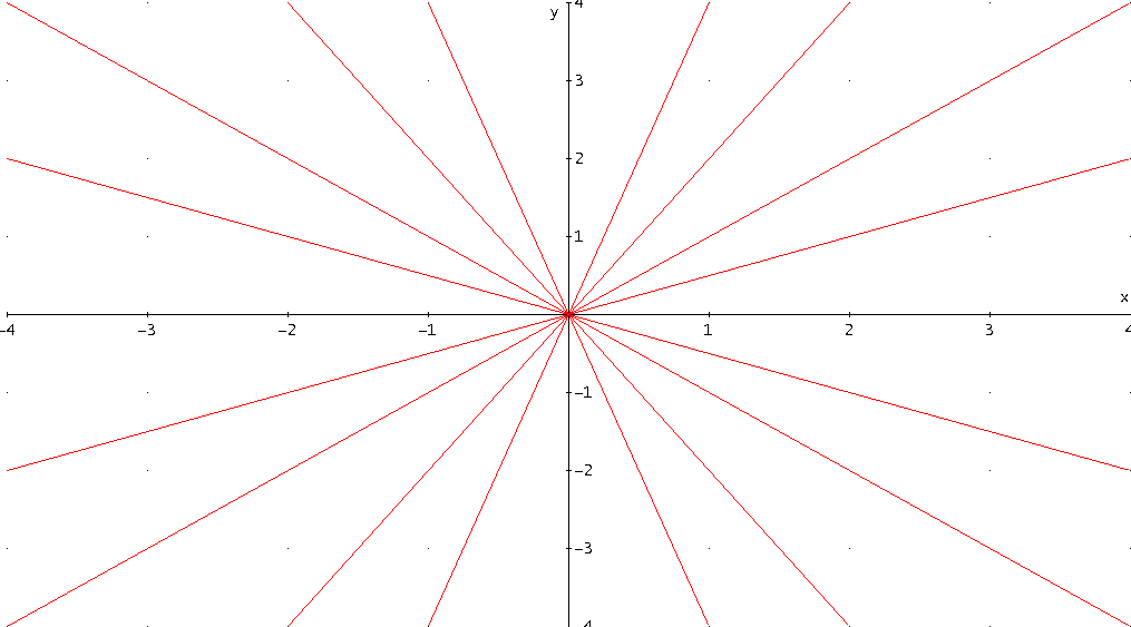 immagine fatta da me con un programma per studi di funzione